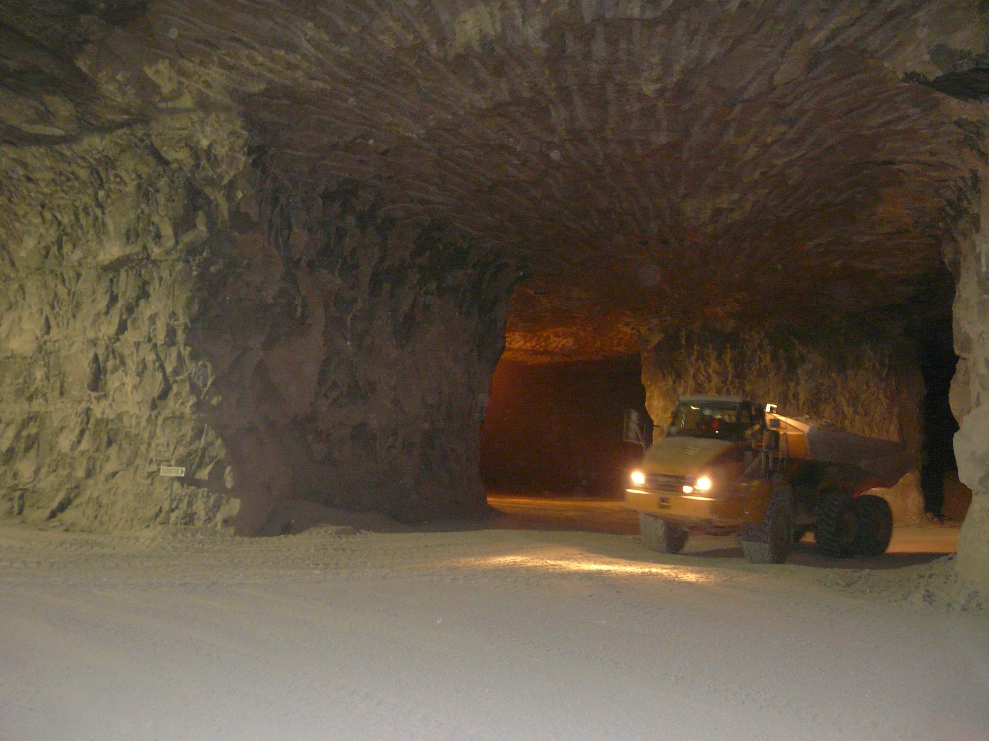 Carrière souterraine de chaux, Saint-Astier, Dordogne, France.